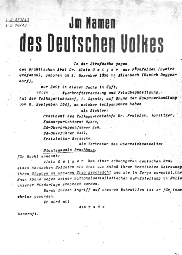 NS, Drittes Reich, Justiz